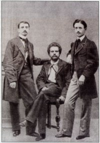 Gli "Amici pedanti": Torquato Gargani, Giosue Carducci, Giuseppe Chiarini. Manca Ottavio Targioni Tozzetti